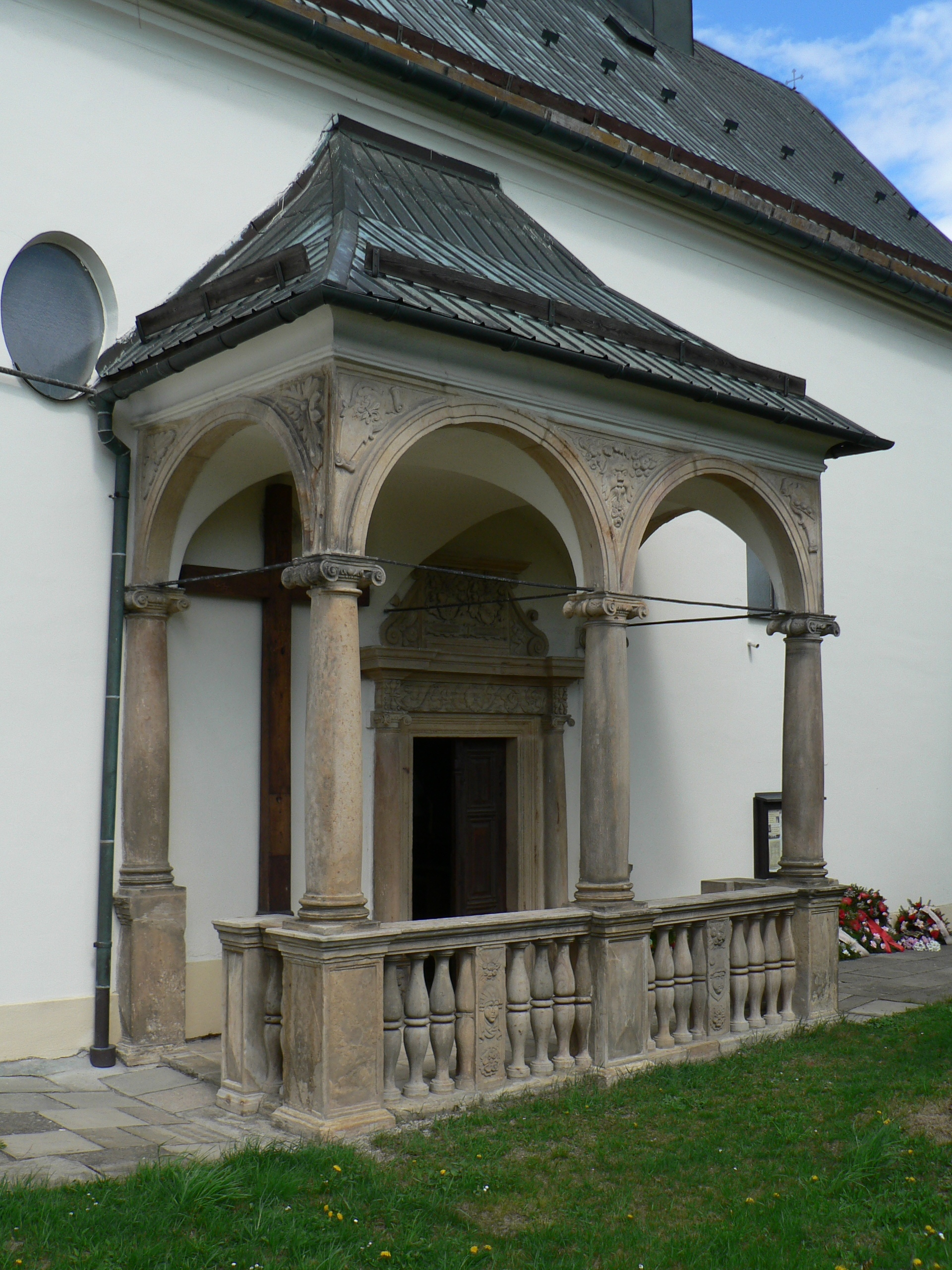 Kostel svatého Martina (Měrotín) - renesanční jižní předsíň (1619).